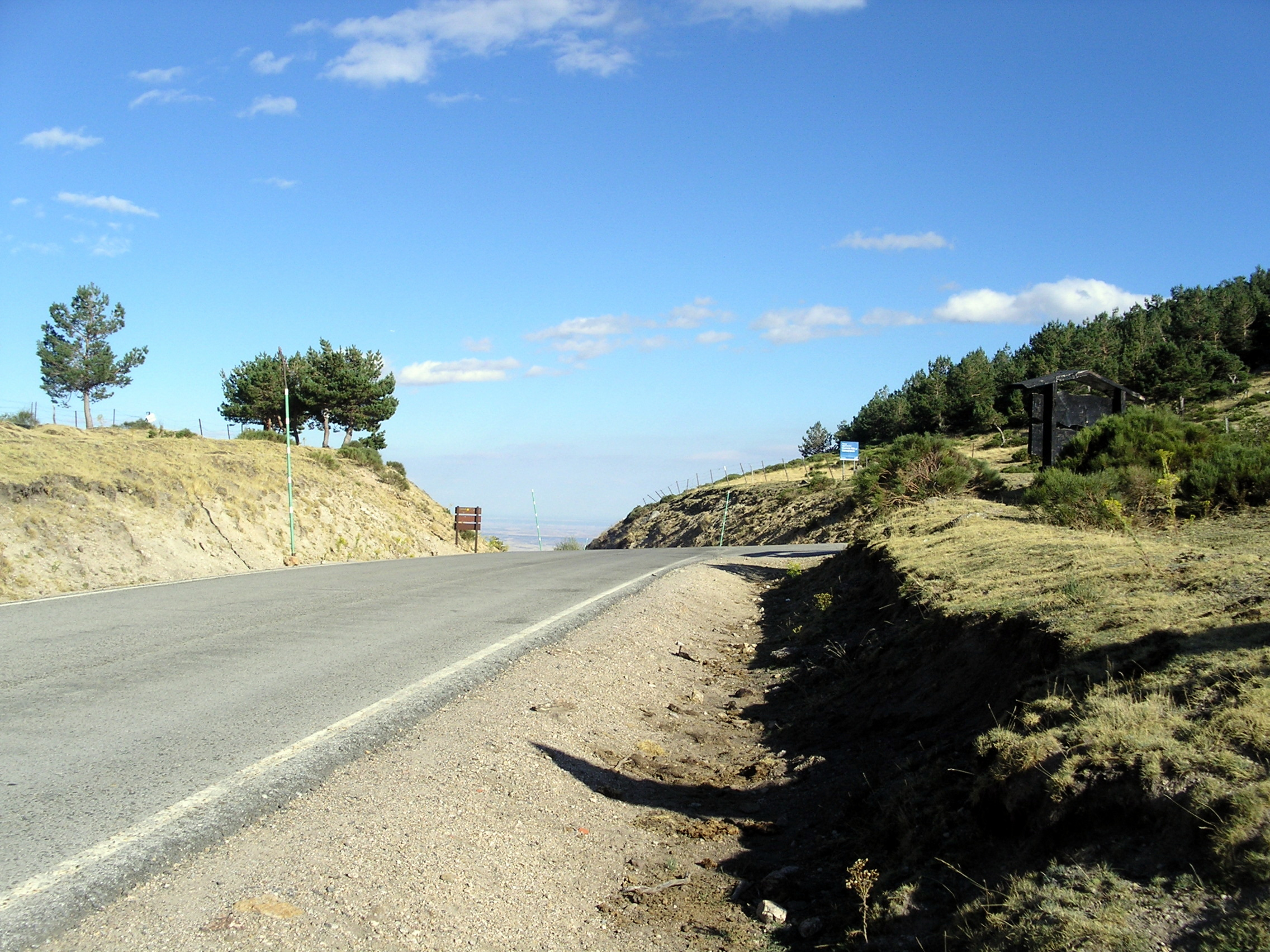 2011-09-18 Puerto de la Morcuera